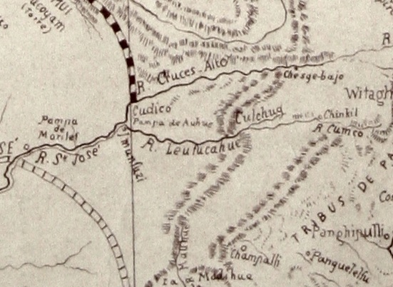 Rio Cruces en el Plano de Arauco y Valdivia 1870